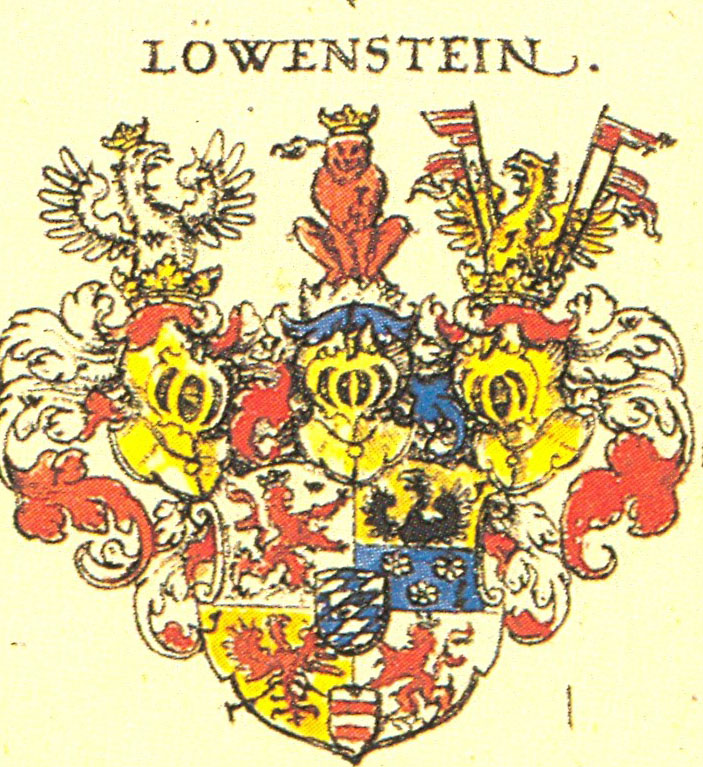 Johann Siebmacher: New Wappenbuch Grafen Löwenstein